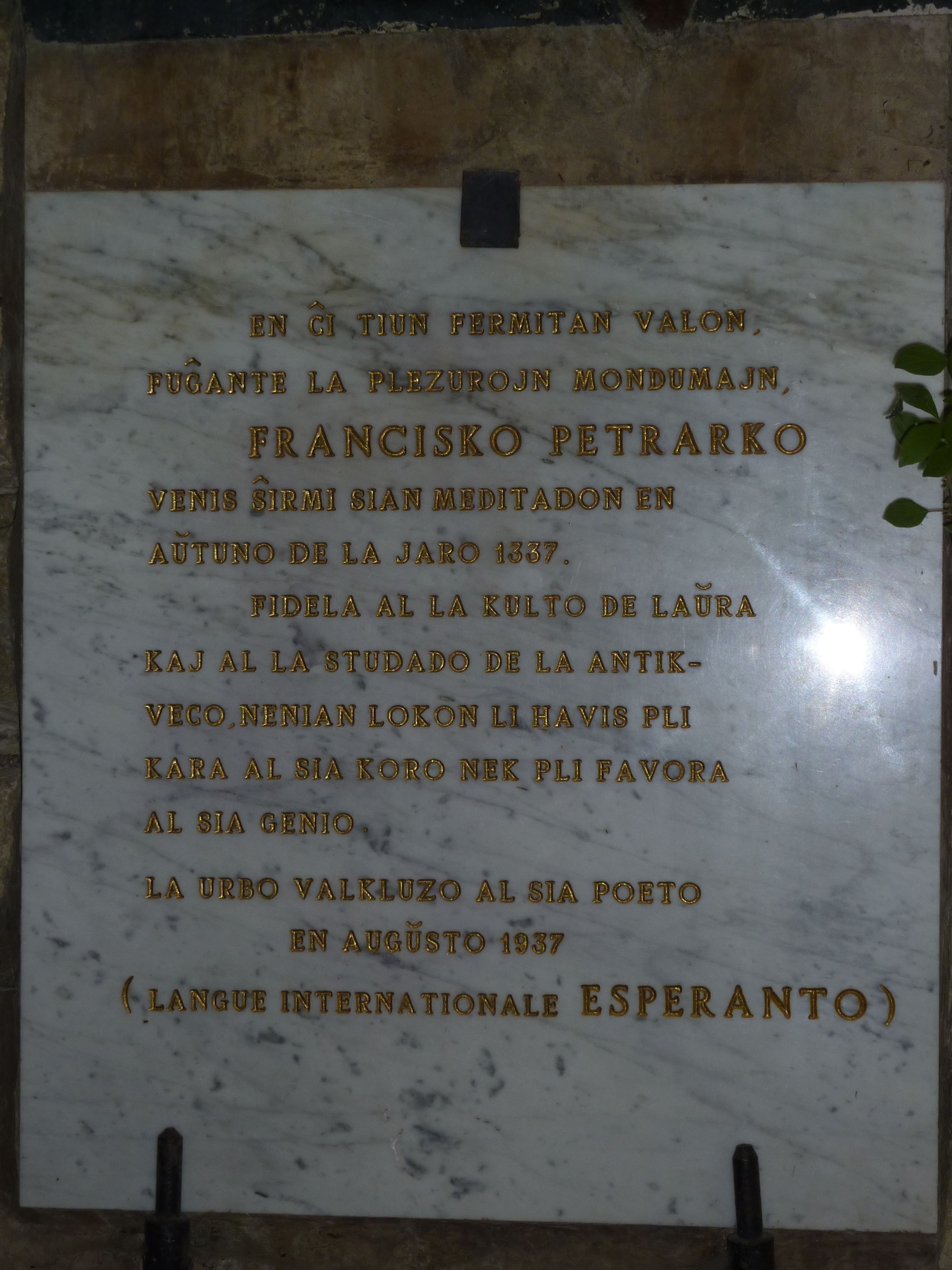 Memortabulo pri Francisko Petrarko en Esperanto